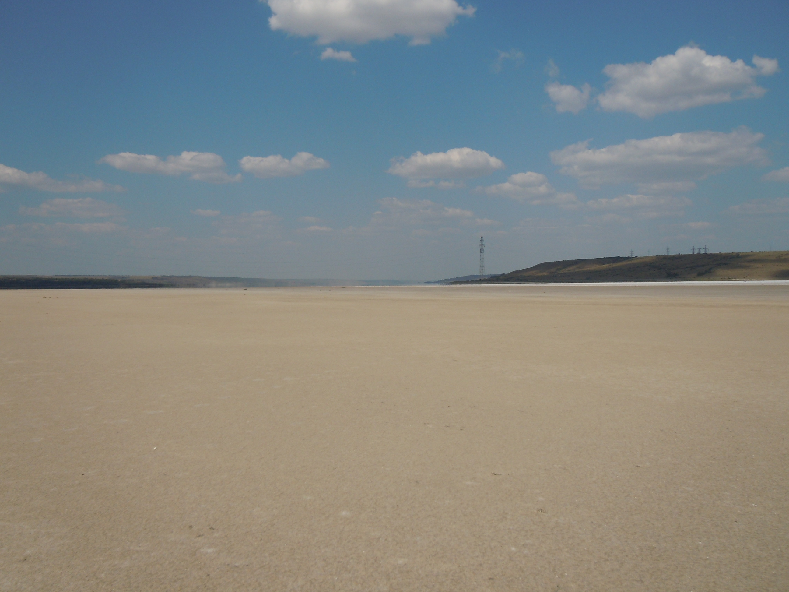 Солева пустеля у верхів'ях Куяльницького лиману